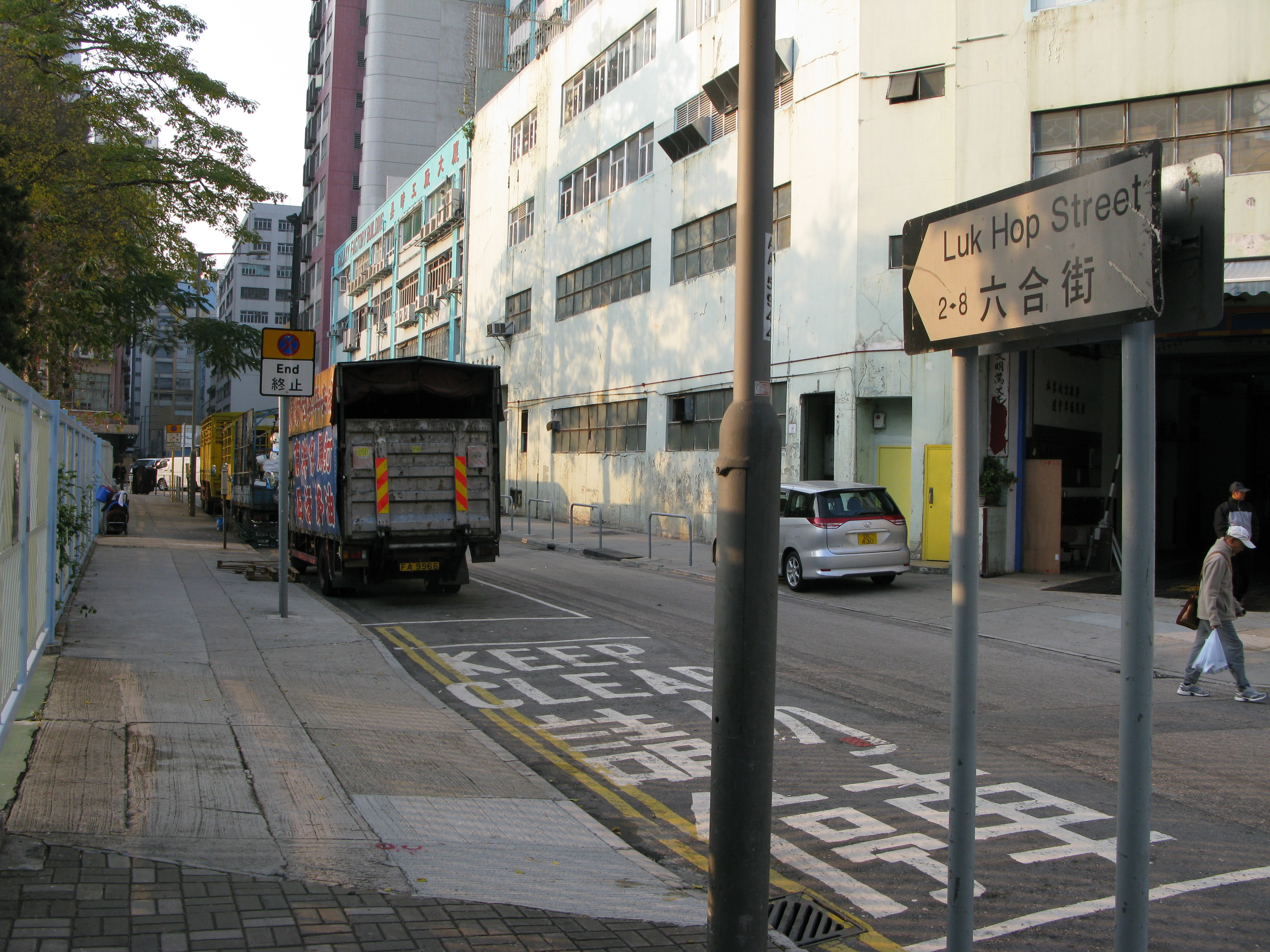 中文（香港）: 香港九龍新蒲崗六合街